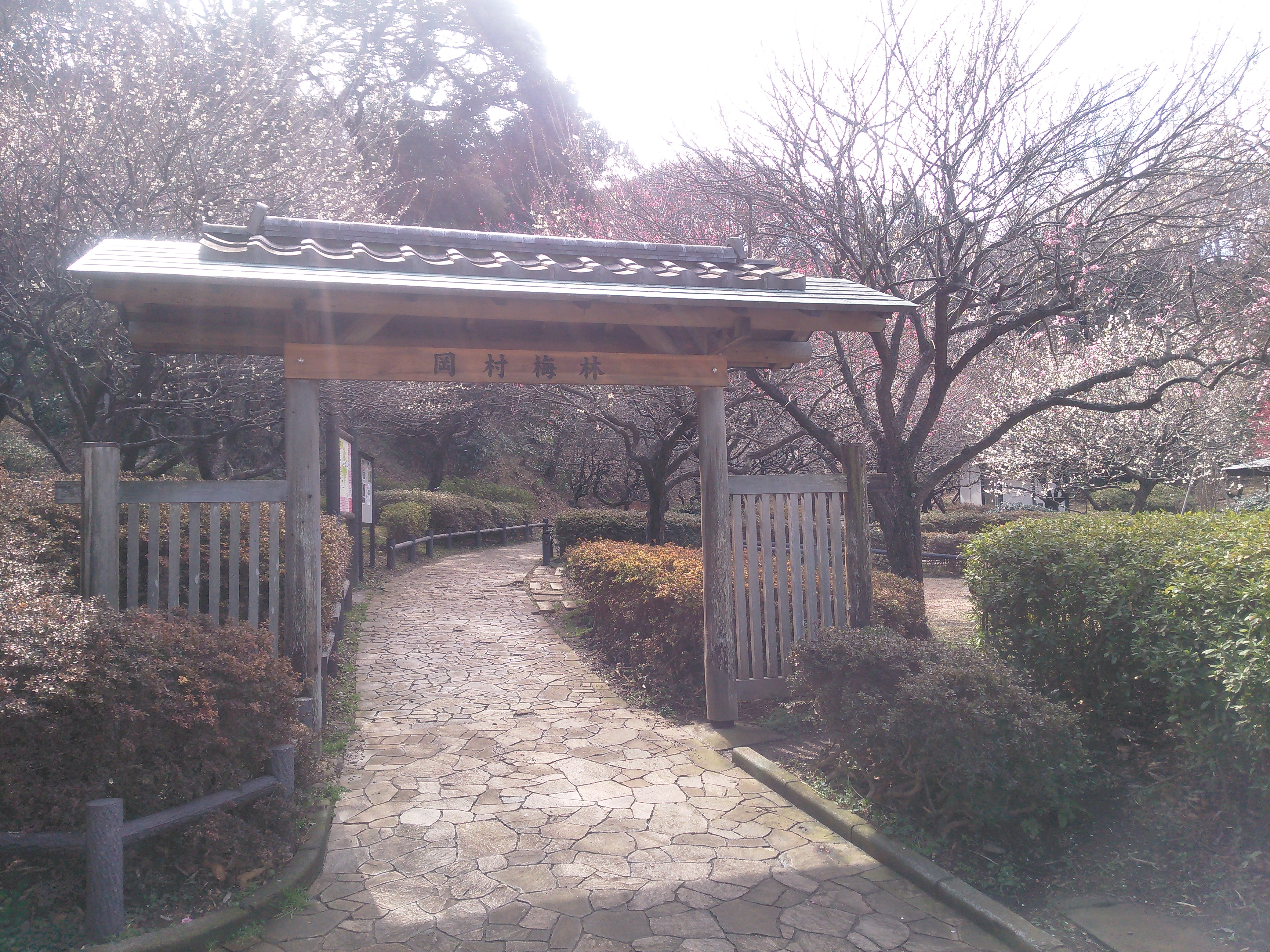 横浜市磯子区、岡村梅林